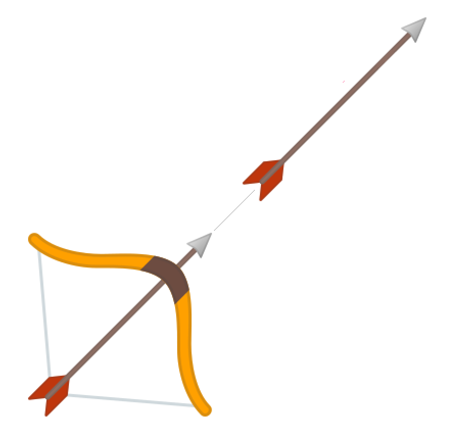 Traiettoria delle fasi di una freccia nel momento in cui viene scoccata da un arco.